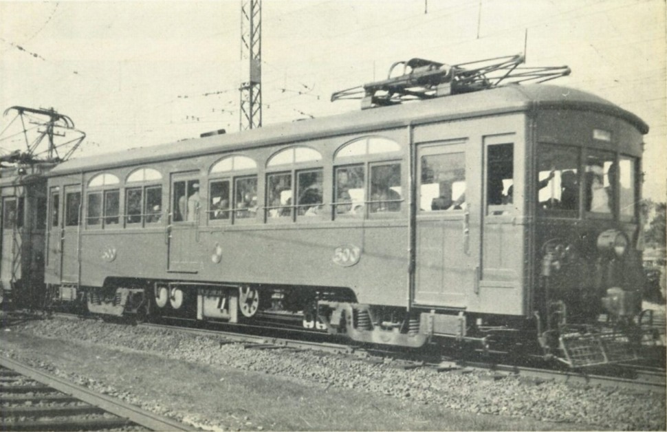 元貴賓車、京王軌道500号。戦災で焼失。昭和14年、桜上水にて。